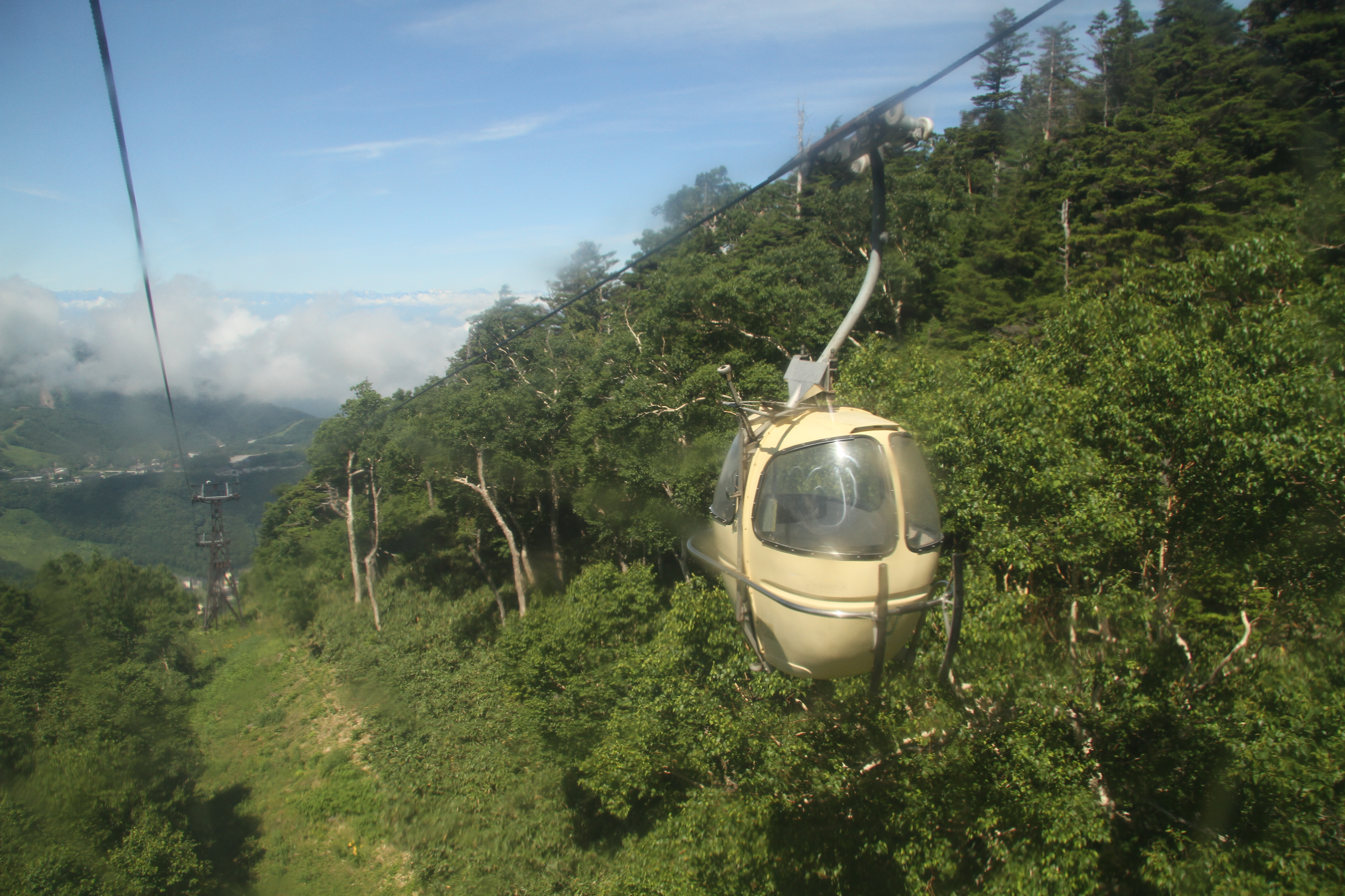 長野県の東館山ゴンドラリフト Canon EOS 7D